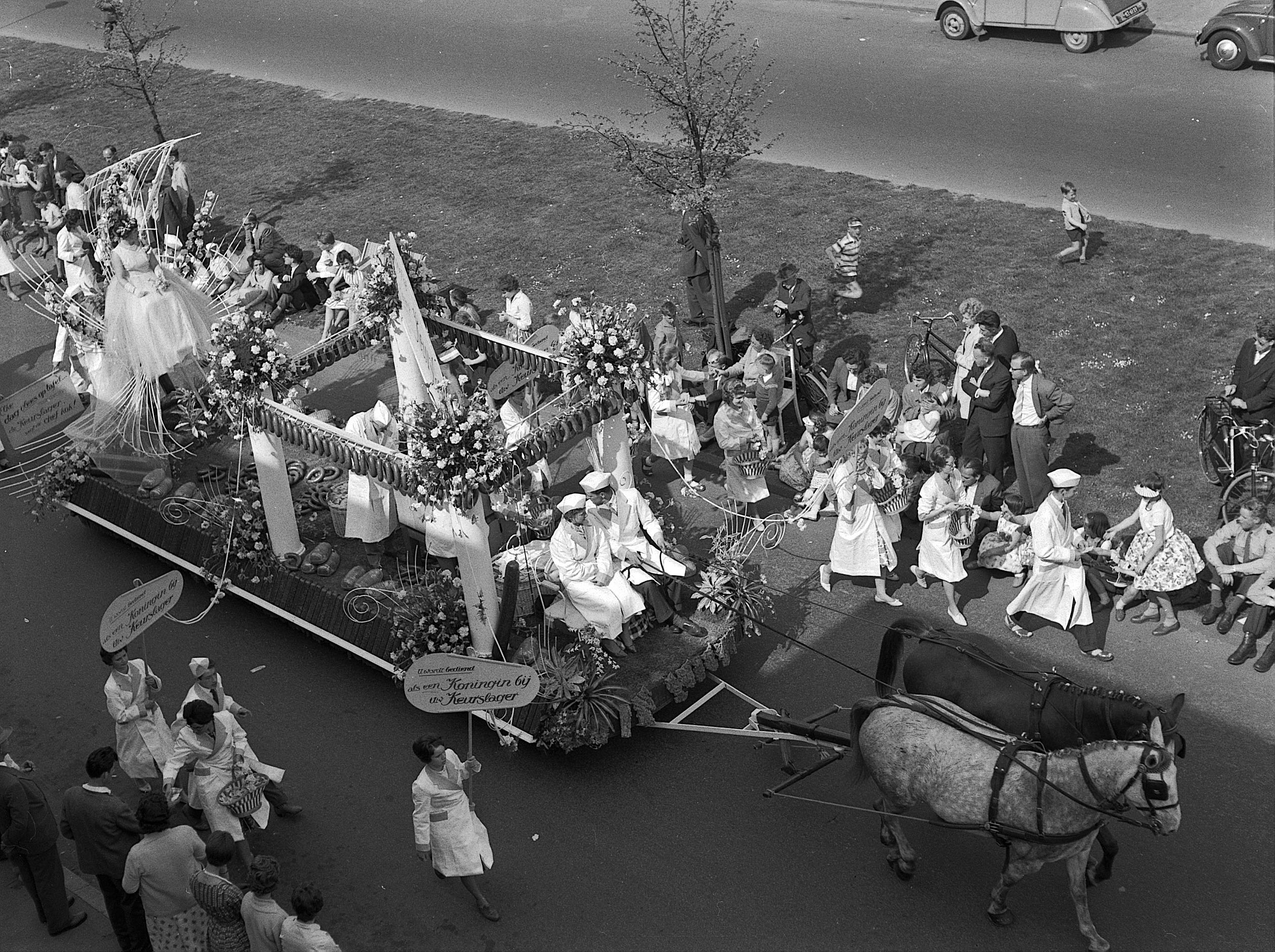 Deelname van de slagers aan de optocht ter gelegenheid van bevrijdingsdag op 5 mei over de Croeselaan in Utrecht